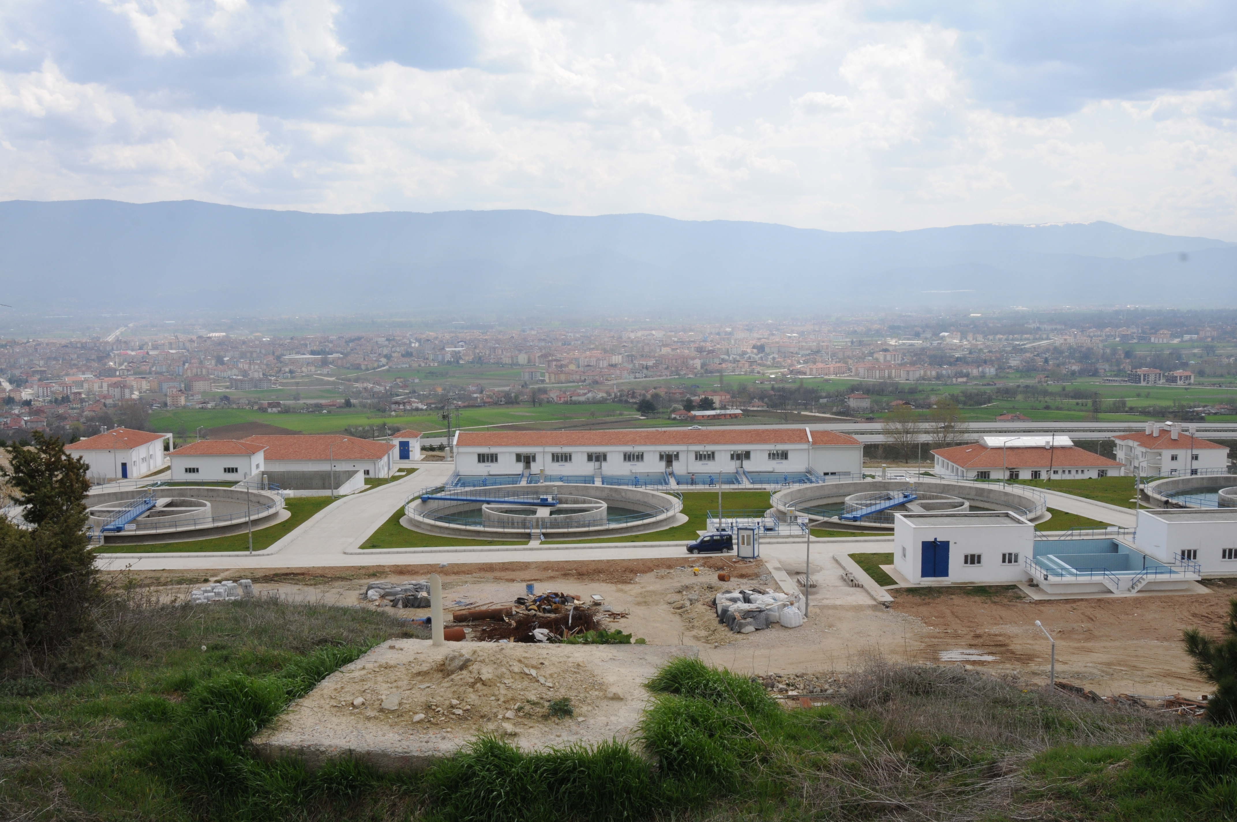 İleri biyolojik atık su arıtma tesisinin yüksekten görünümü.Bu fotoğraf tesis atık su almaya müsait olduğu zaman çekilmiştir.